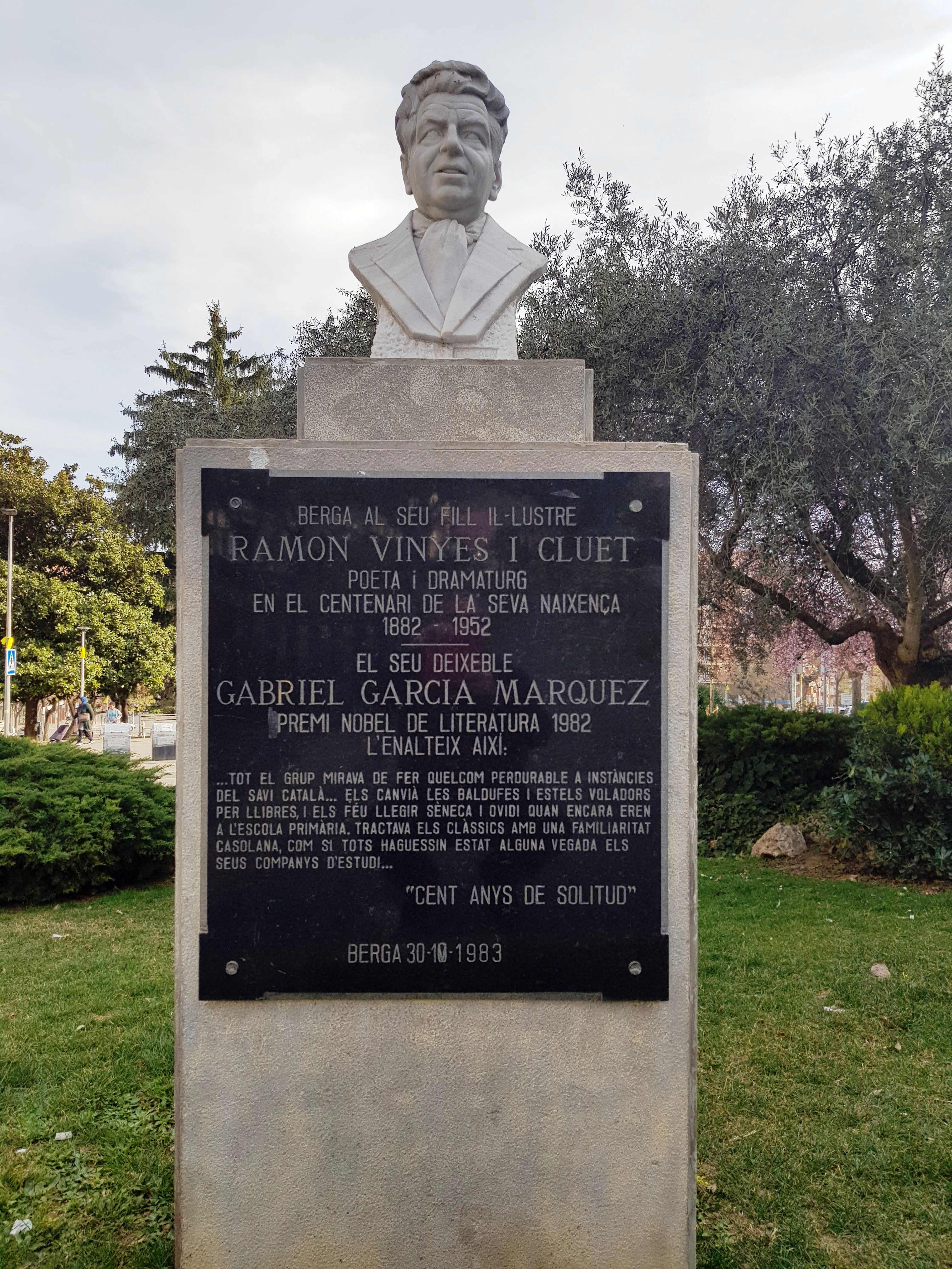 Bust de Ramon Vinyes i Cluet (Berga, 8 de maig de 1882 – Barcelona, 5 de maig de 1952) fou un escriptor d'obres de teatre, poesia i contes.